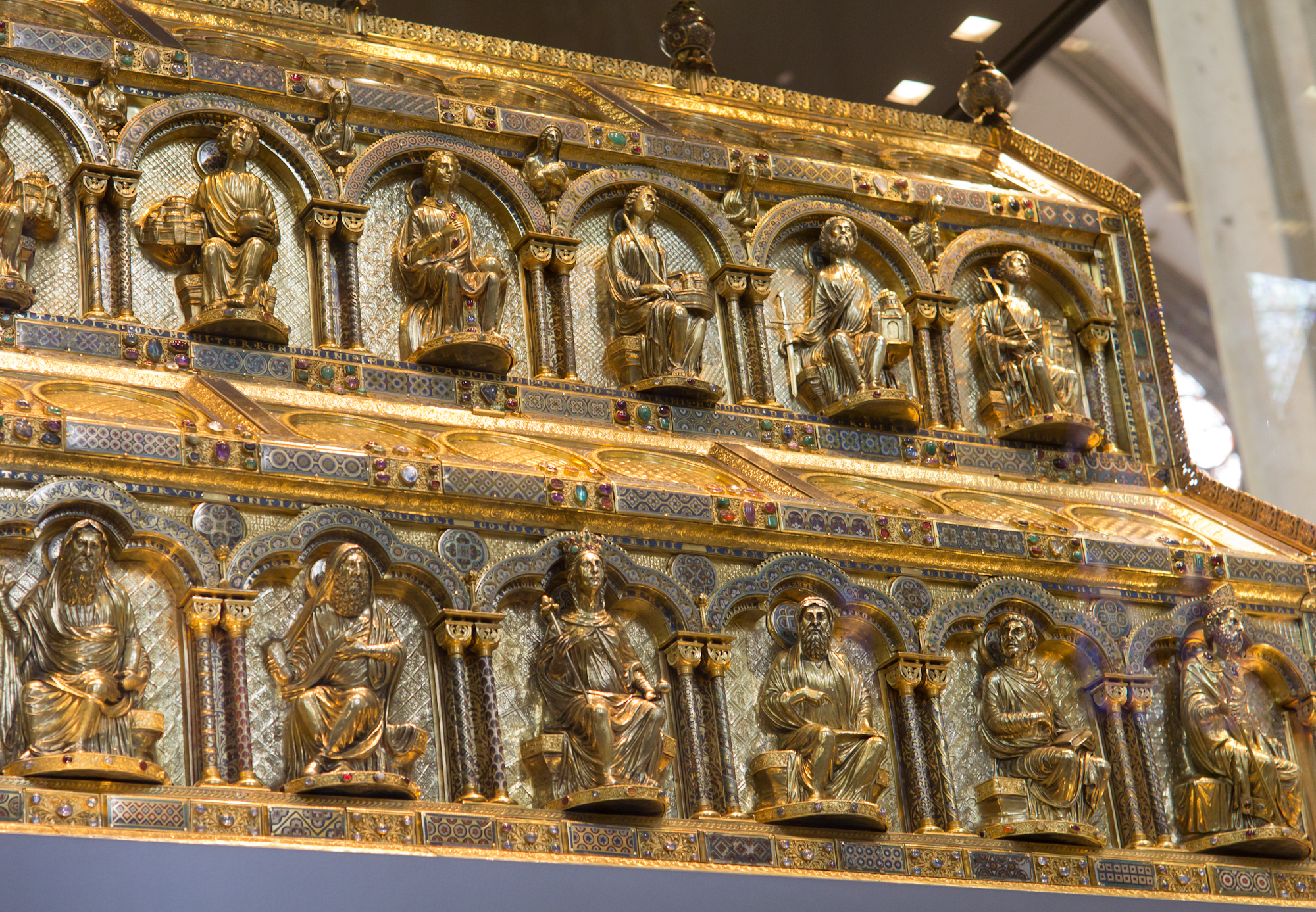 Dreikönigenschrein, Kölner Dom. Teilansicht der Salomonsseite (links, heraldisch rechts)